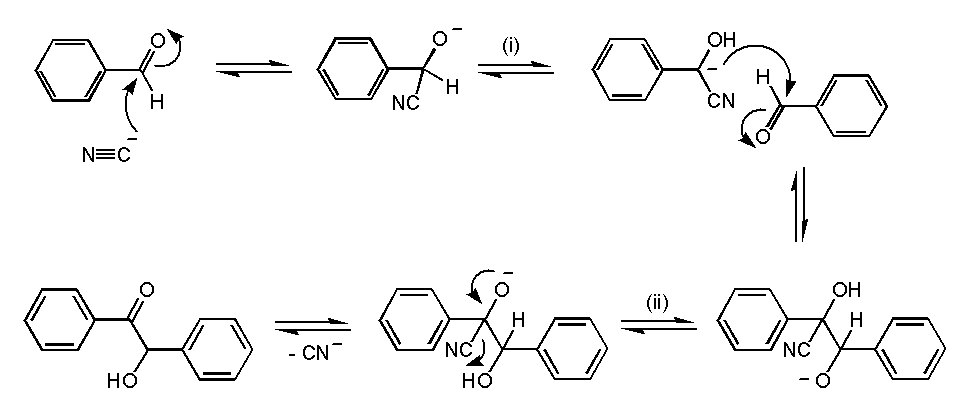 Benzoïnecondensatie